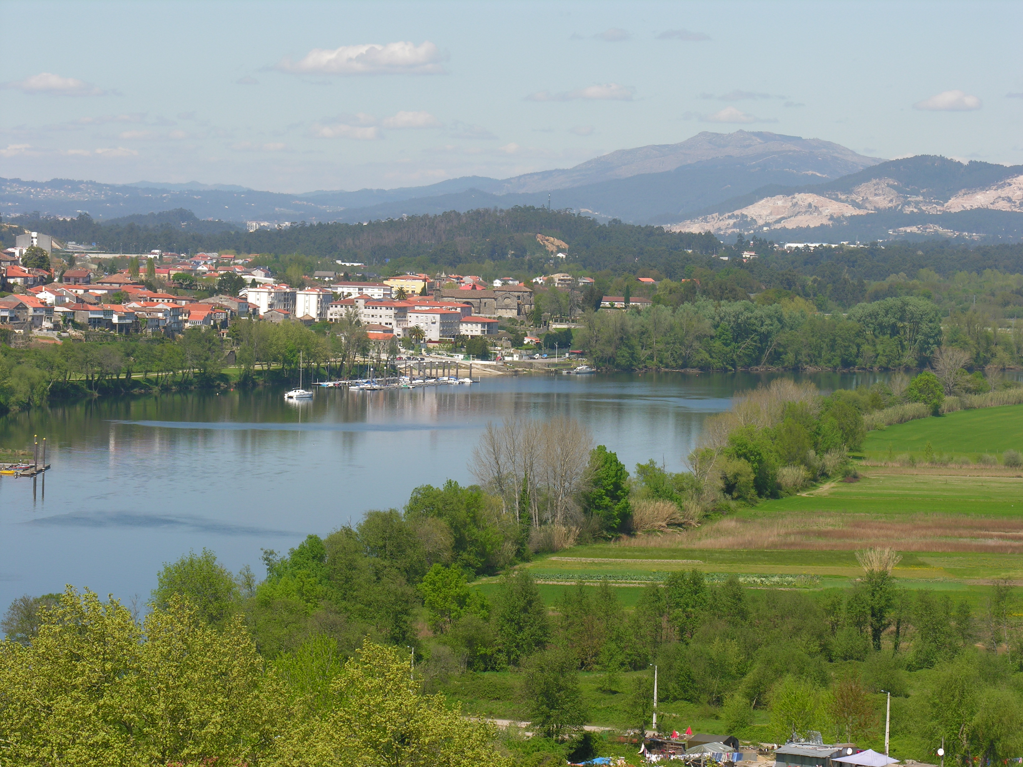 Foto de Tui (Galicia) e do río Miño desde Valença (Portugal) Publish by= Luis Miguel Bugallo Sánchez. Self made